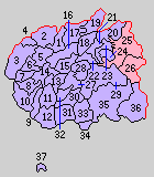 愛知県幡豆郡の町村制時点の町村。